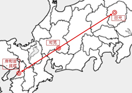 説明補足用画像